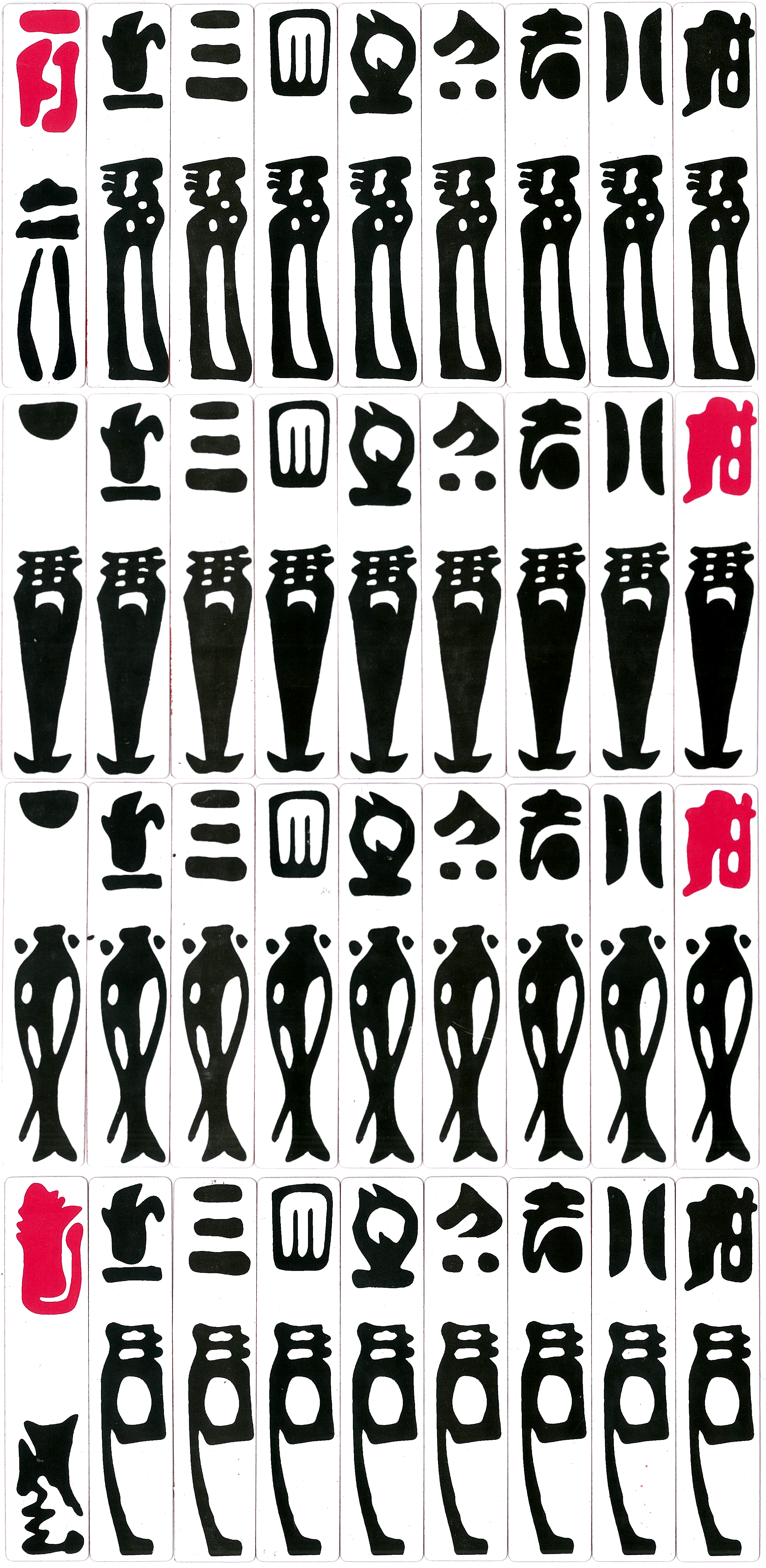 四川的六紅牌